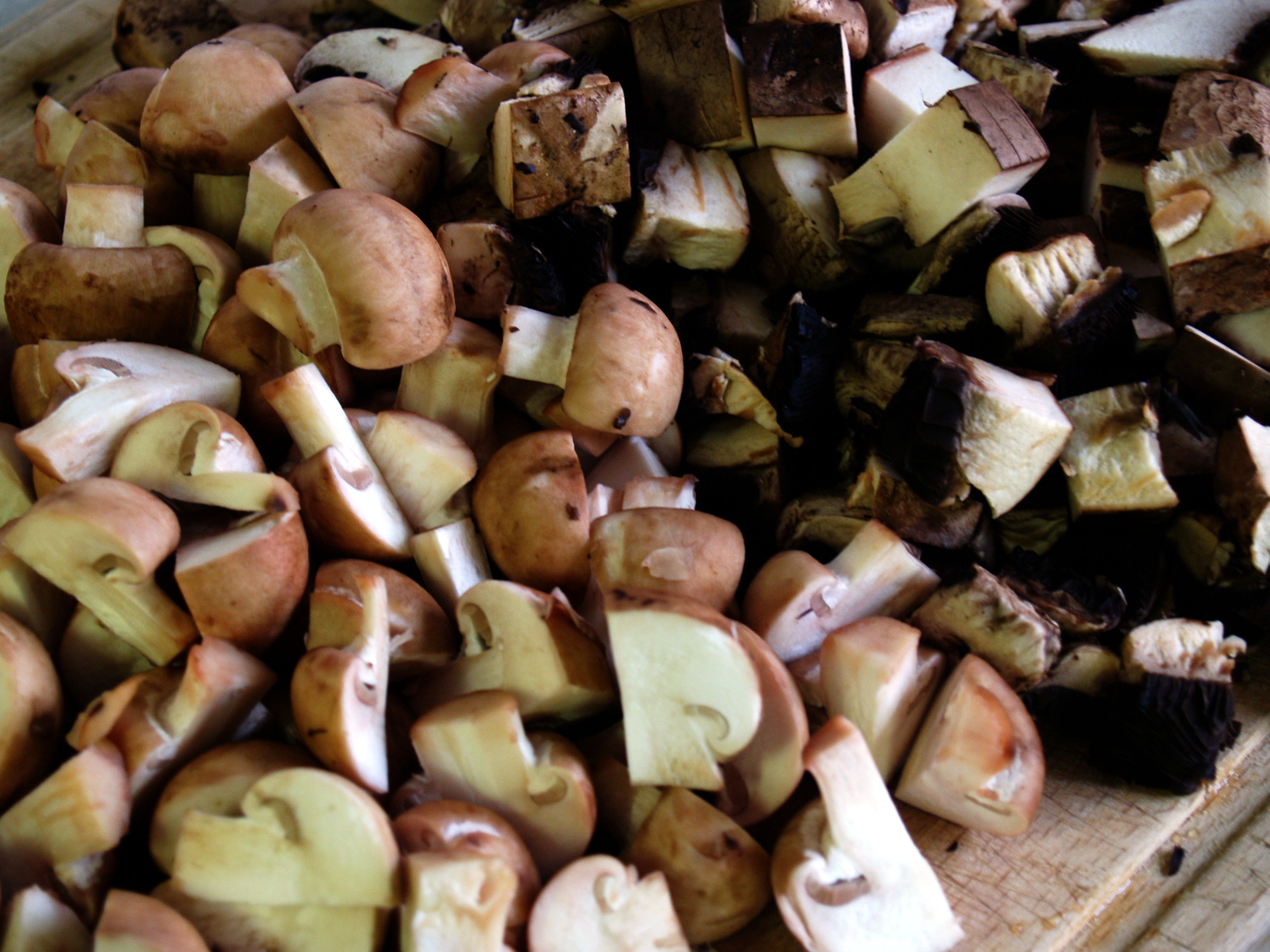 Champignon og portobello